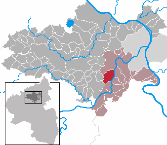 Lehmen in Rhineland-Palatinate - district Mayen-Koblenz